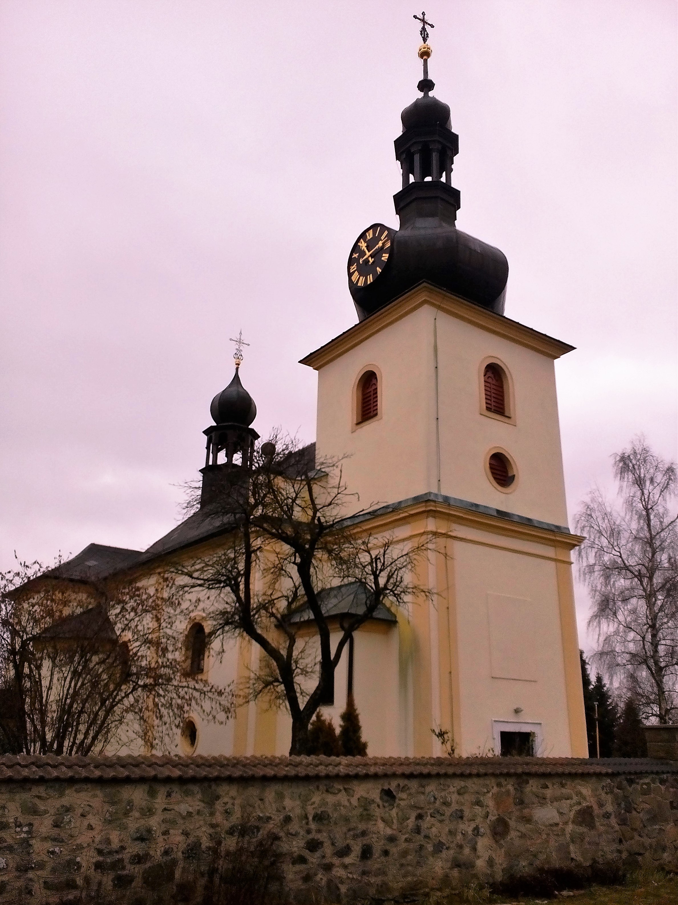 Barokní kostel sv. Václava v obci Malá Bukovina na Děčínsku.